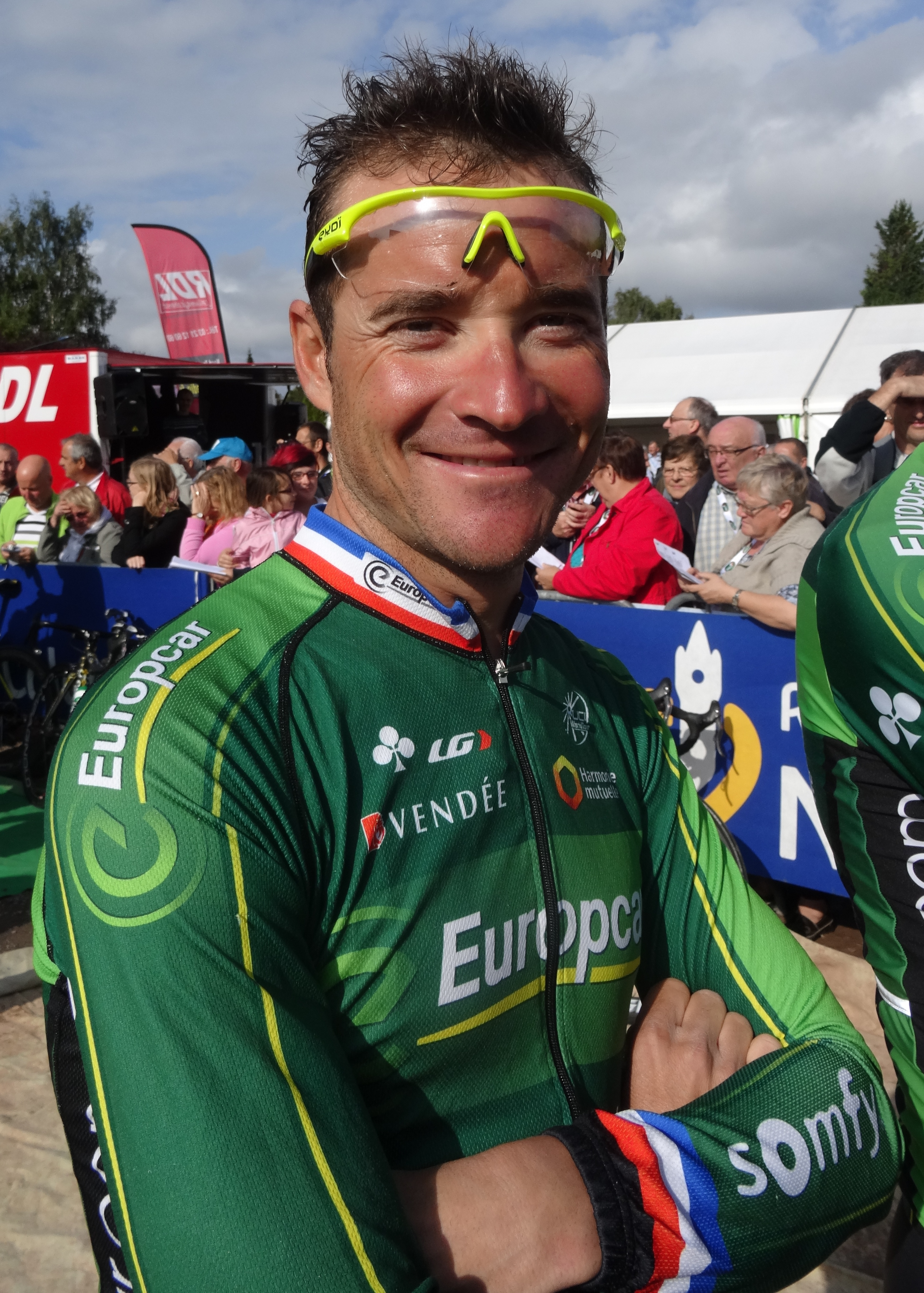 Reportage réalisé le dimanche 21 septembre à l'occasion du départ et de l'arrivée du Grand Prix d'Isbergues 2014 à Isbergues, Nord-Pas-de-Calais, France.